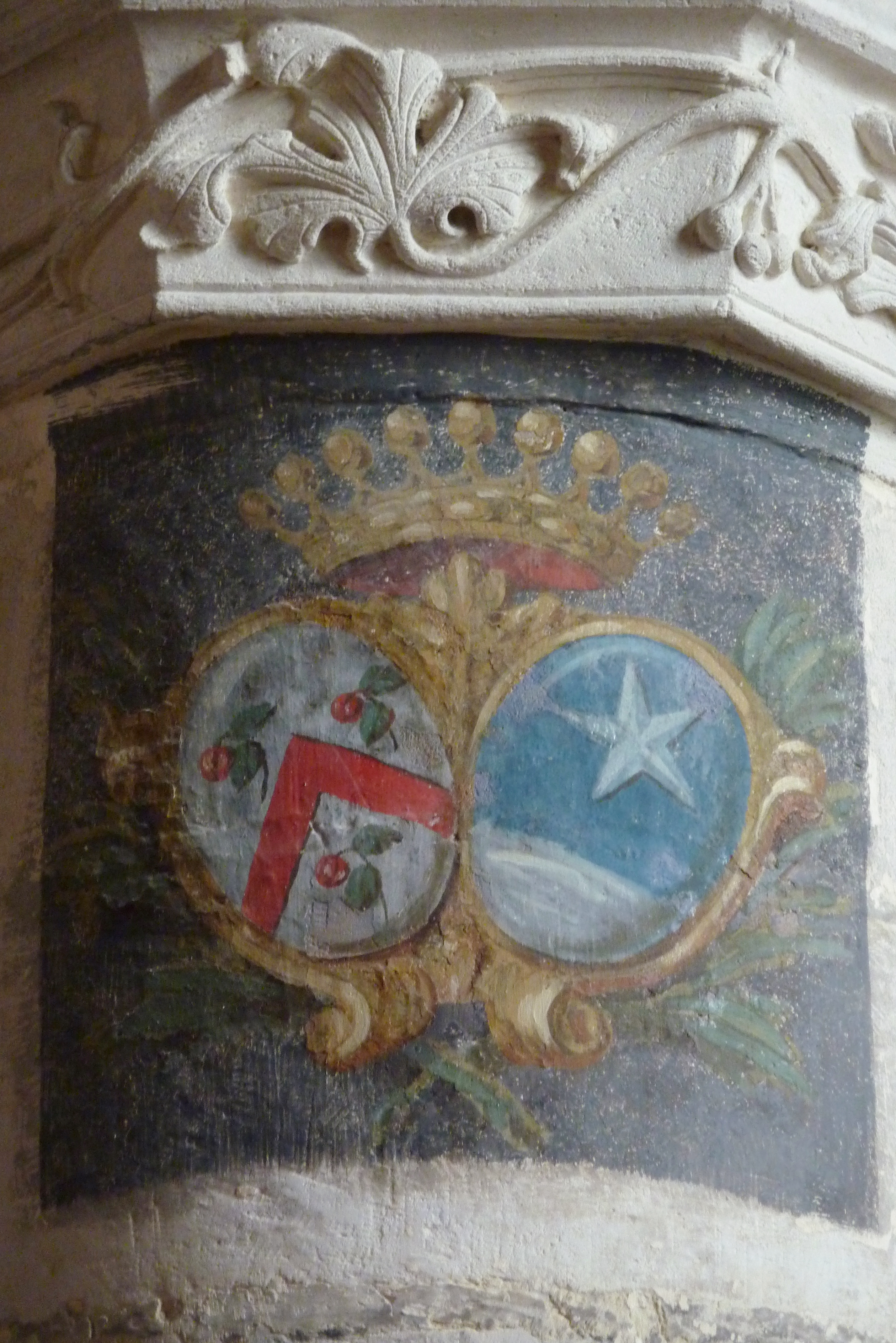 katholische Pfarrkirche Saint-Justin in Louvres